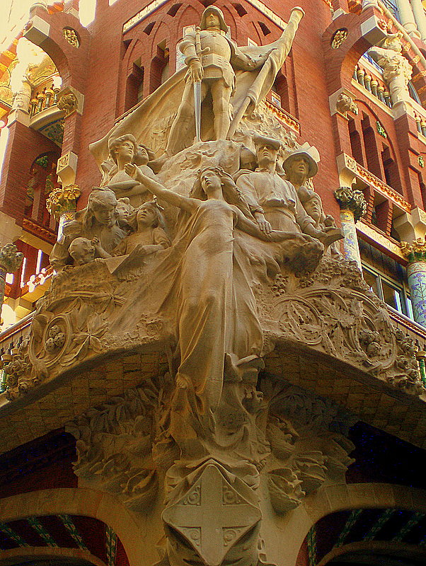 Barcelona - Palau de la Música Catalana. El Palau va ser inaugurat el 1908 amb un breu concert en el qual es van interpretar peces de Clavé i Händel. La façana projectada per Domènech i Montaner va sorprendre als barcelonins. D´obra vista, de bella policromia gràcies a l´ús de revestiments de mosàic ceràmic, est`presidida a la cantonada per un espectacular grup escultòric de Miquel Blay : una enorme proa de pedra que representa una al-legoria de la música popular. És una obra d´un elevat simbolisme conceptual, amb dos nens i dos ancians abraçant una nimfa mentre Sant Jordi els protegeix amb la bandera catalana onejant al vent.